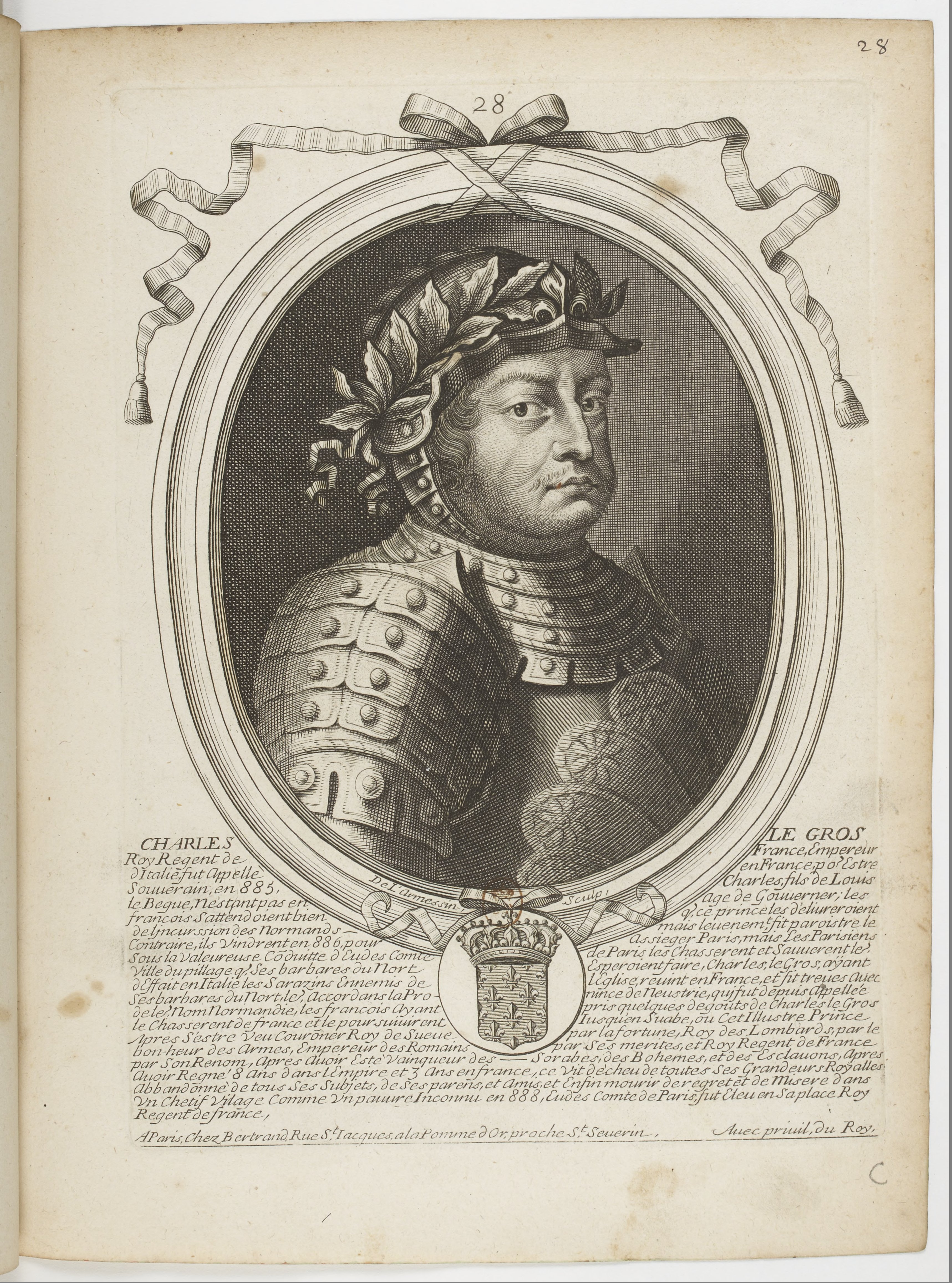 Les augustes représentations de tous les rois de France, depuis Pharamond jusqu'à Louis XIV,... avec un abrégé historique sous chacun, contenant leurs naissances, inclinations et actions plus remarquables pendant leurs règnes